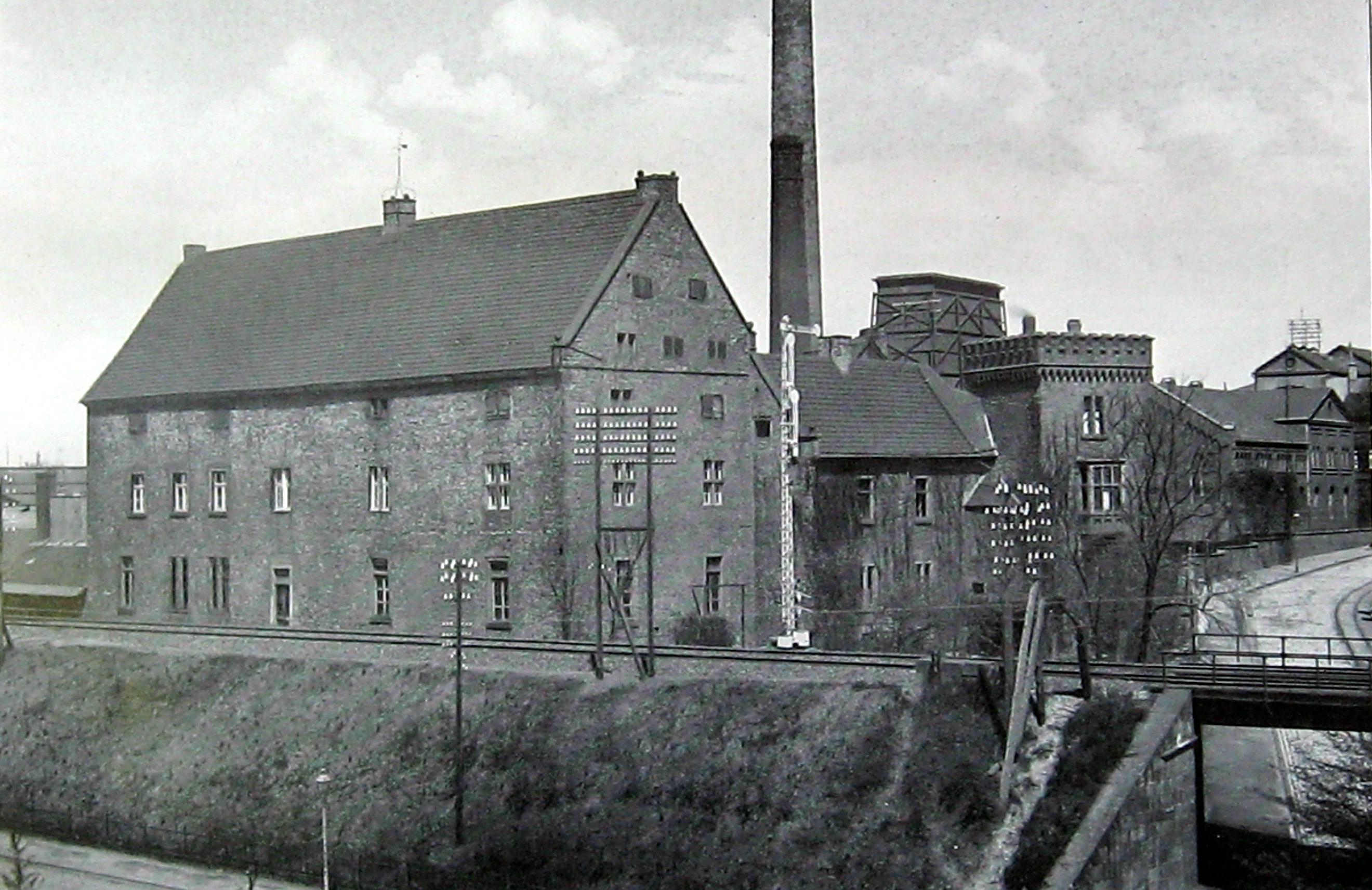 Haus Witten um 1900 ist Teil des angrenzenden Stahlwerks